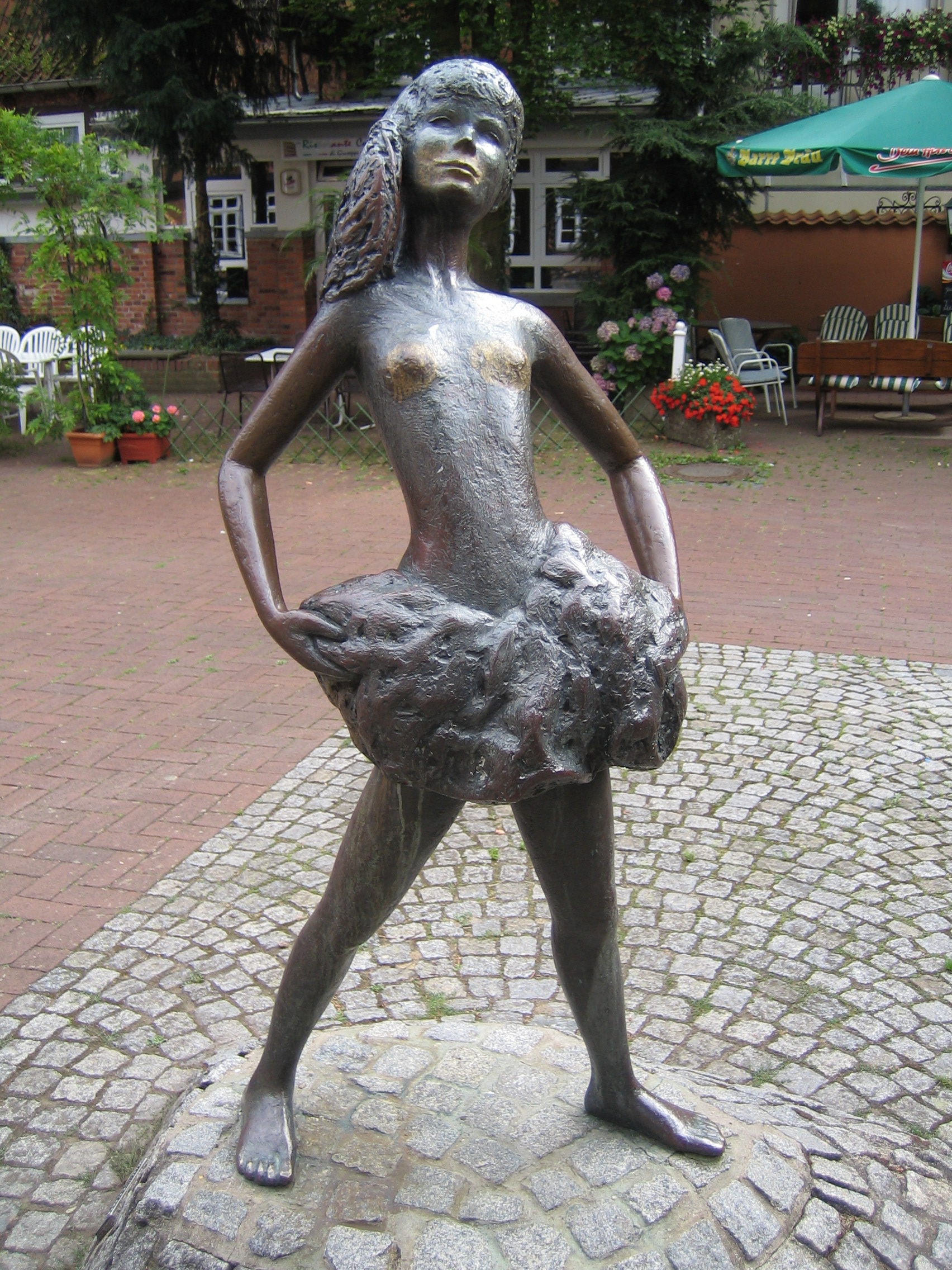 sculpture Kleine Nienburgerin von Marianne Bleeke-Ehret in Nienburg/Germany